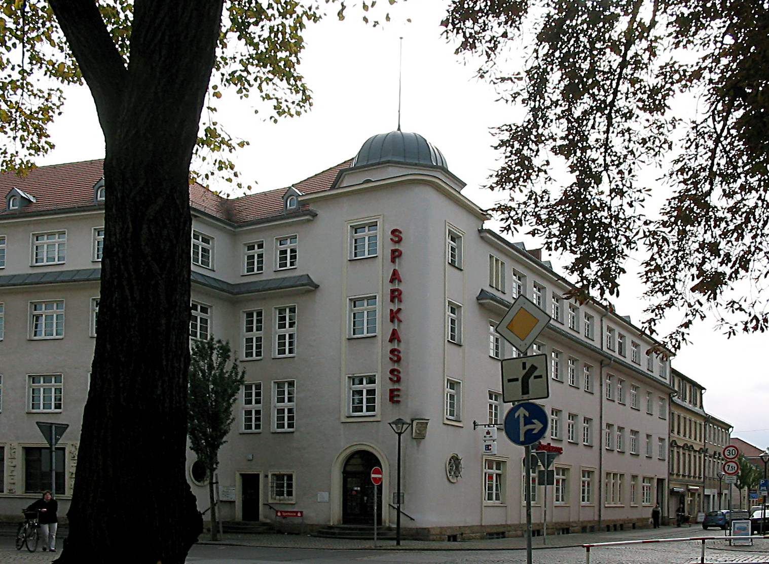 Radebeul, Verwaltungs-, Geschäfts- und Wohngebäude der Sparkasse Kötzschenbroda, Bahnhofstraße 20